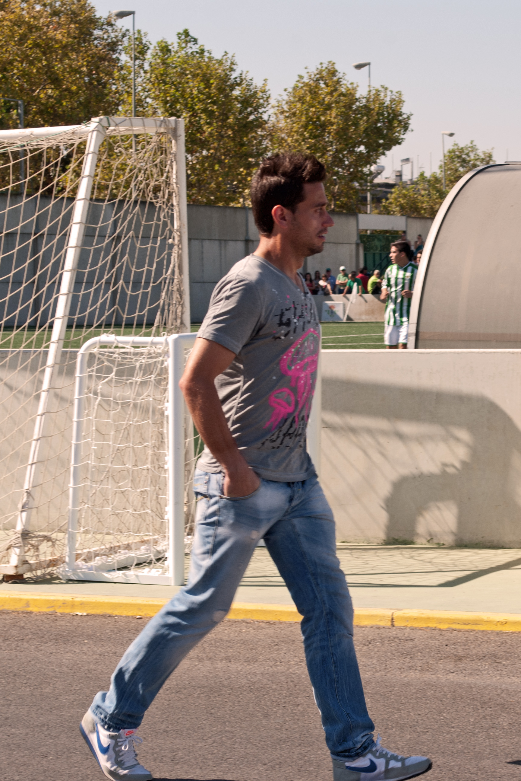 Casto en la ciudad deportiva del Real Betis, octubre de 2011